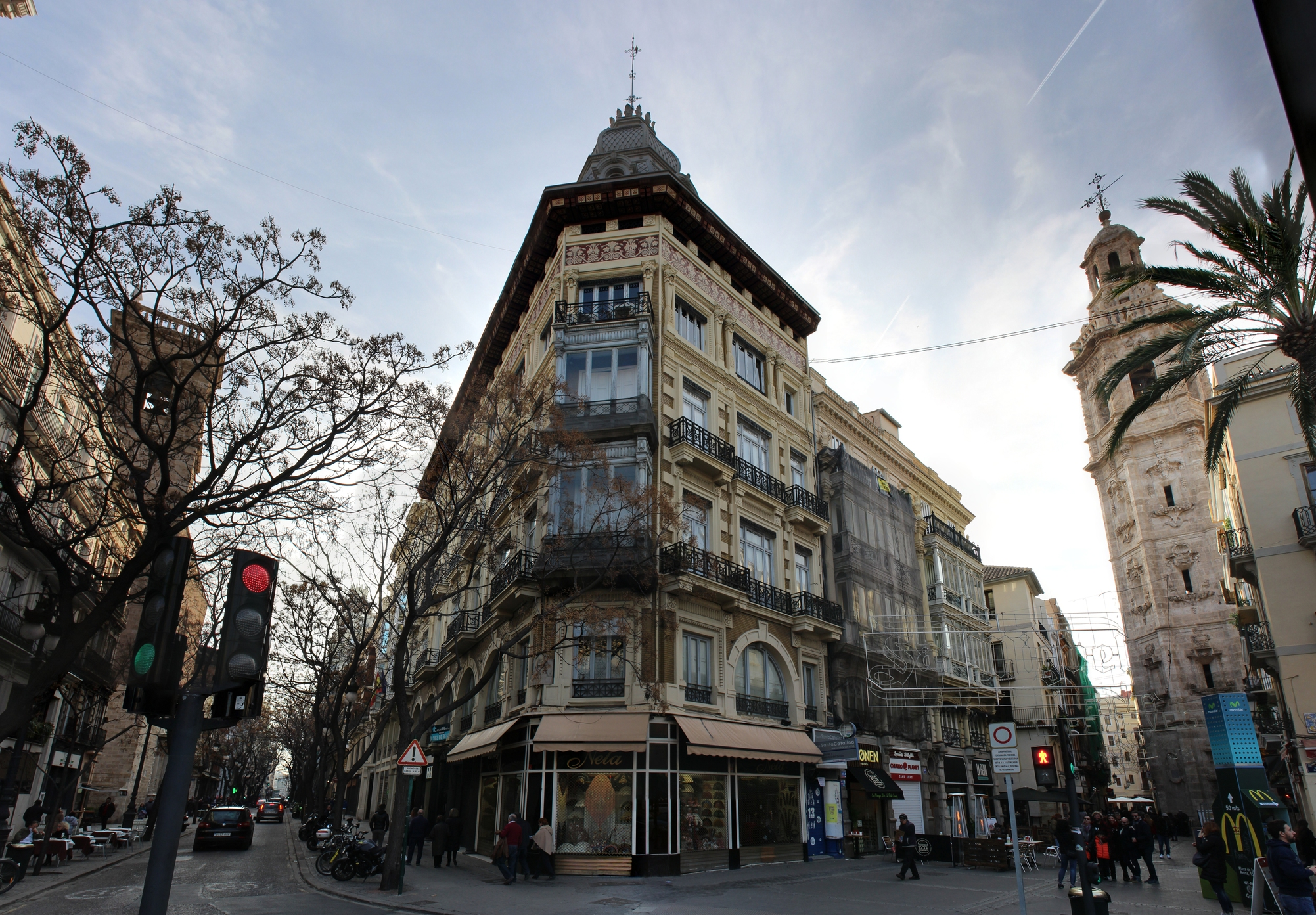 Edificio Sánchez de León de Lucas García Cardona (1896) en Valencia